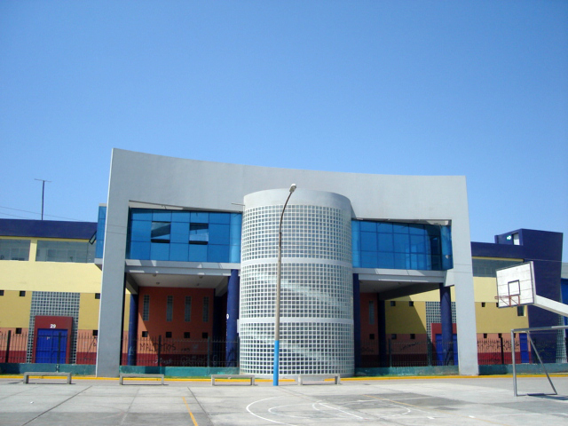 Entrada principal del estadio Mansiche de Trujillo.